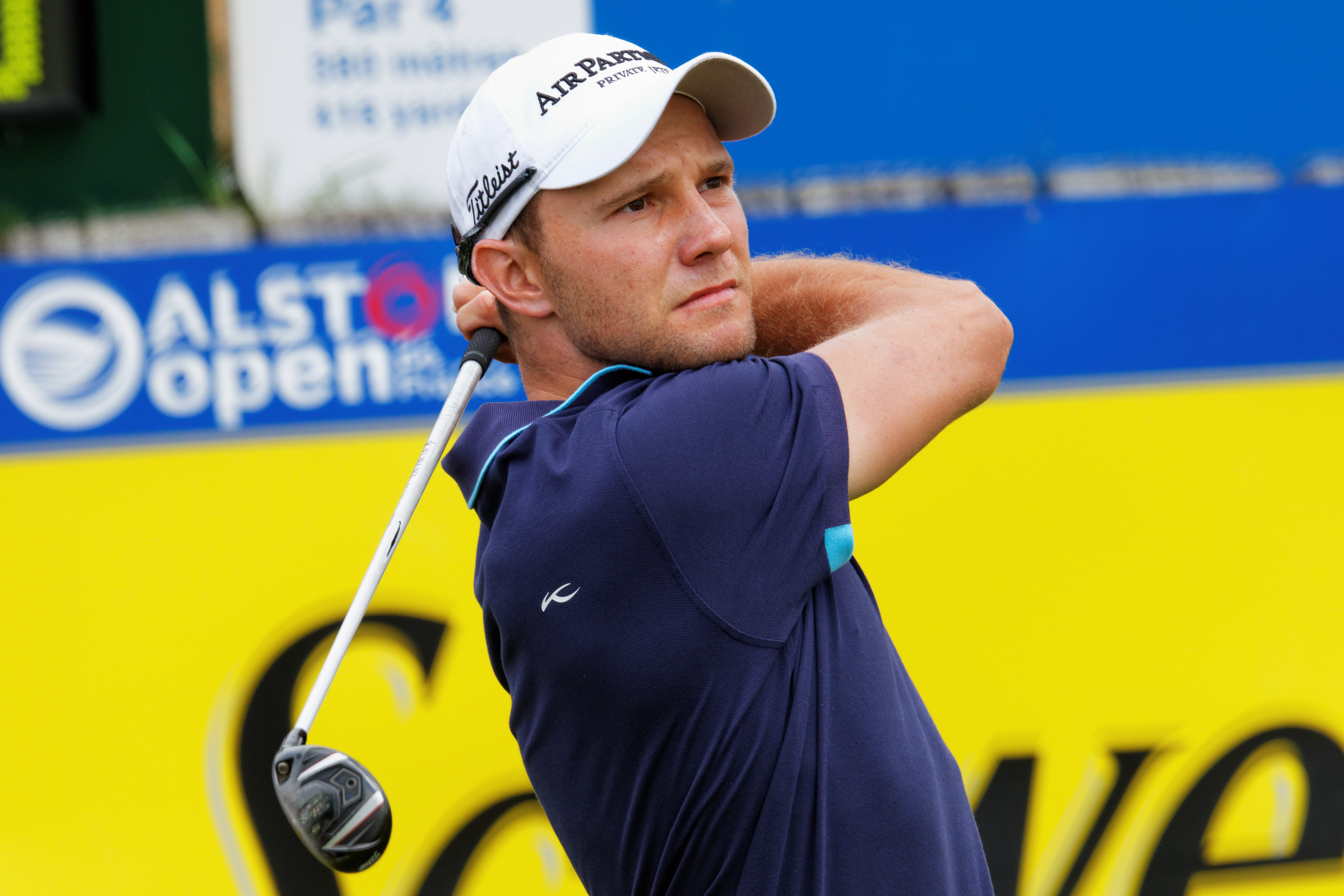 Image prise lors de l'Alstom - Open de France 2015